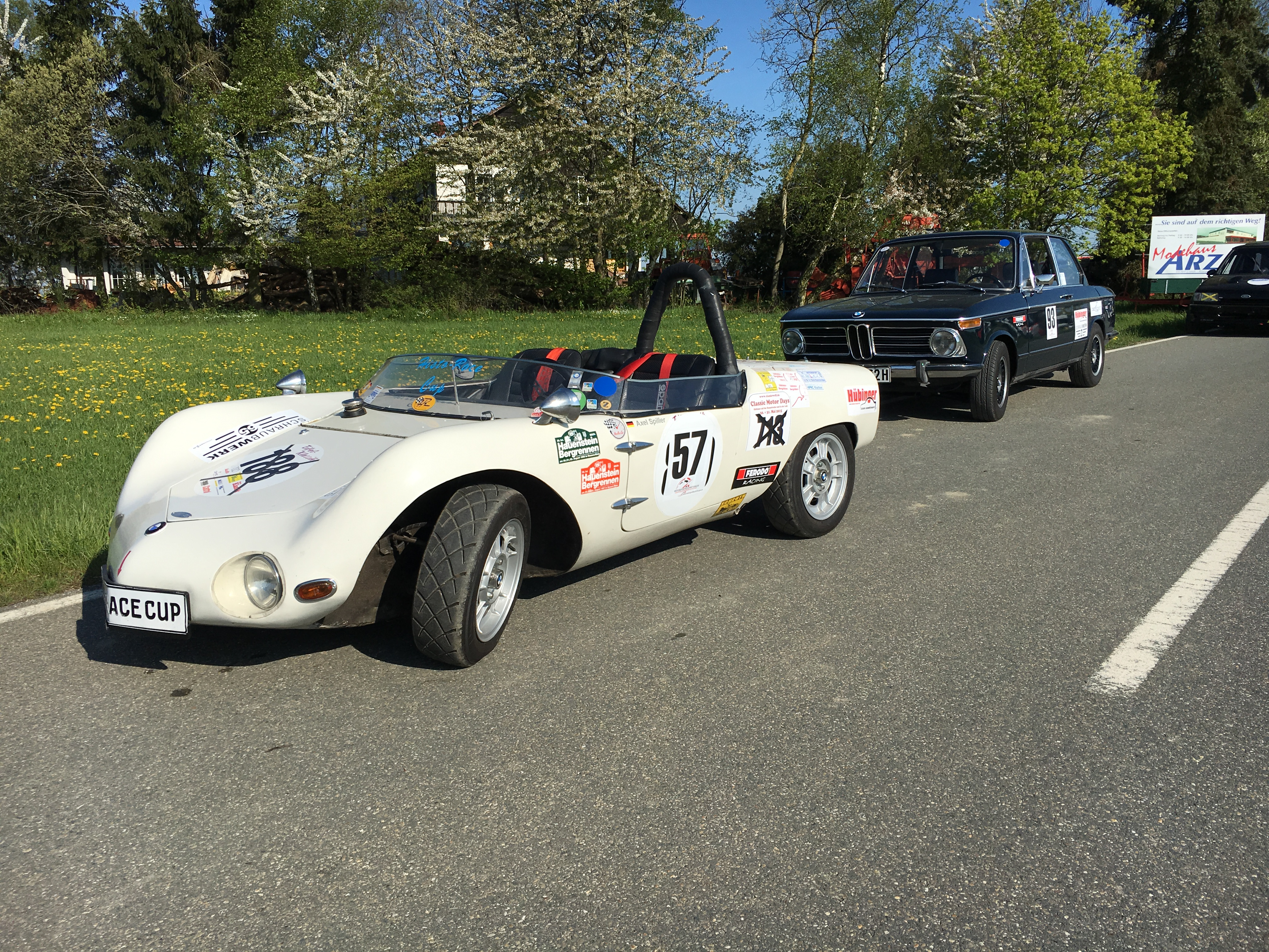 Baujahr: 1959 (in Wuppertal) Motor: BMW 700 ca. 50PS Bremsen+Achsen: BMW 700 Chassis: BMW 600 (wegen des vorhandenen Bodenrahmens) mit Gitterrohrgestell handgefertigte Aluminiumkarosserie Leergewicht: 460KG Fahrzeugeinzelabnahme mit Straßenzulassung im März 1962